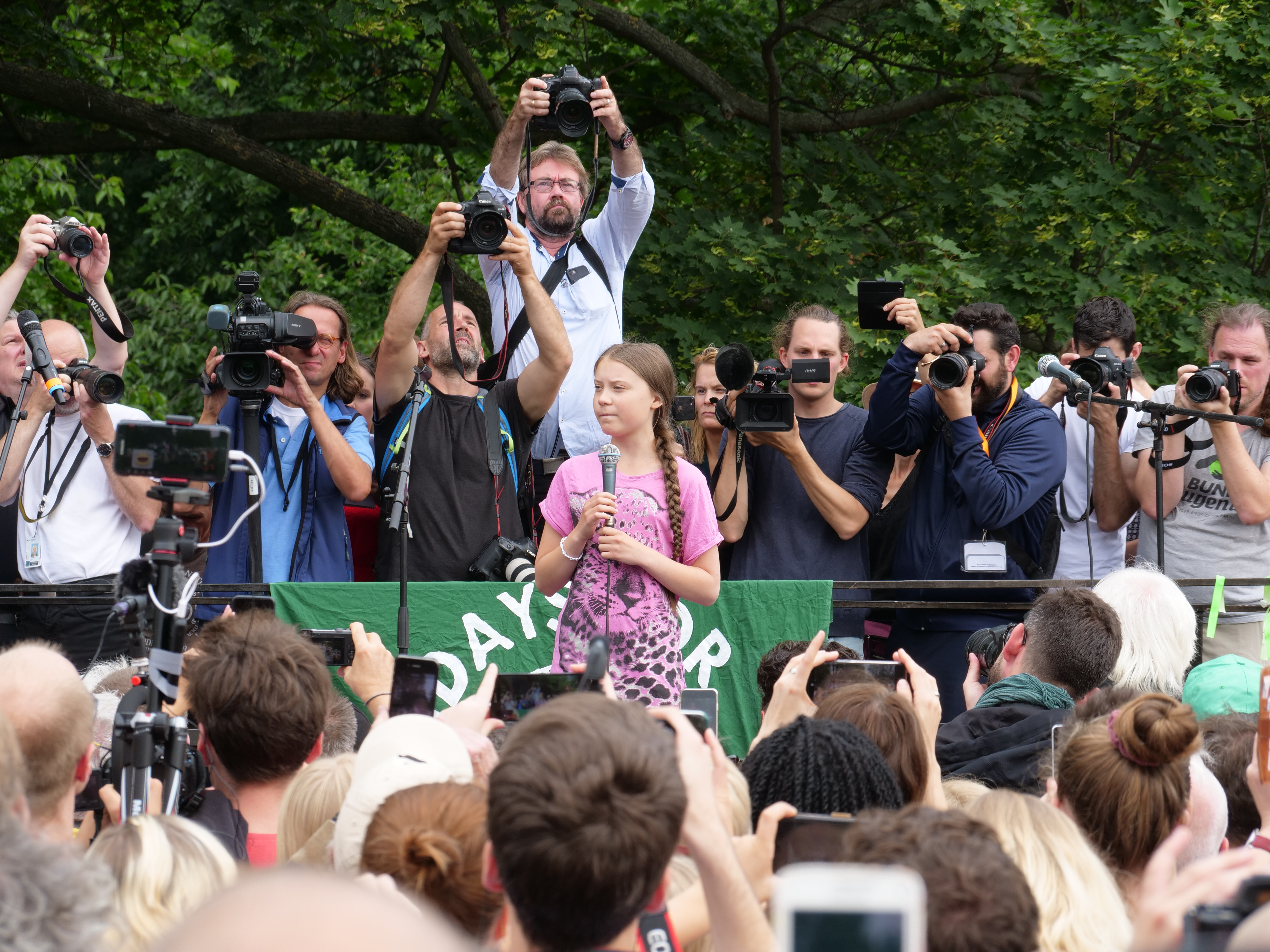 FridaysForFuture Kundgebung im Invalidenpark in Berlin am 19. Juli 2019.